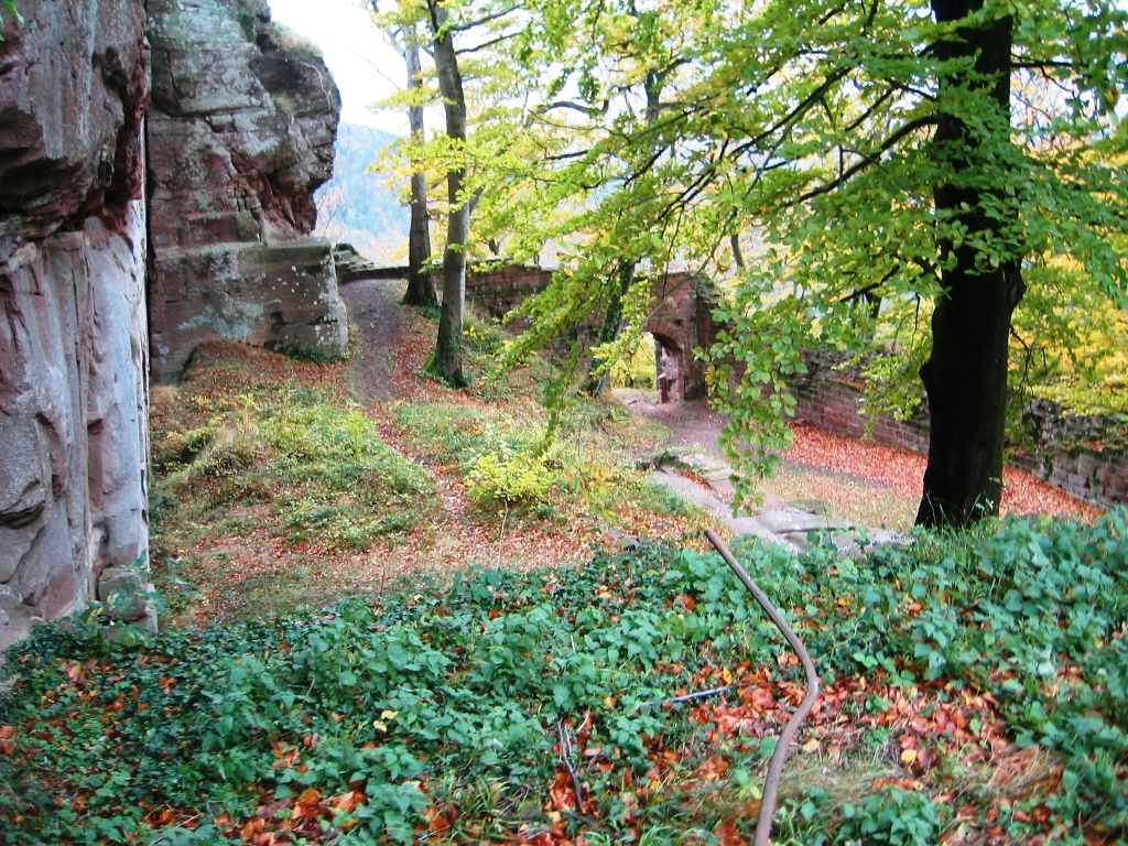 Hof der Burg Guttenberg im Pfälzer Wald.